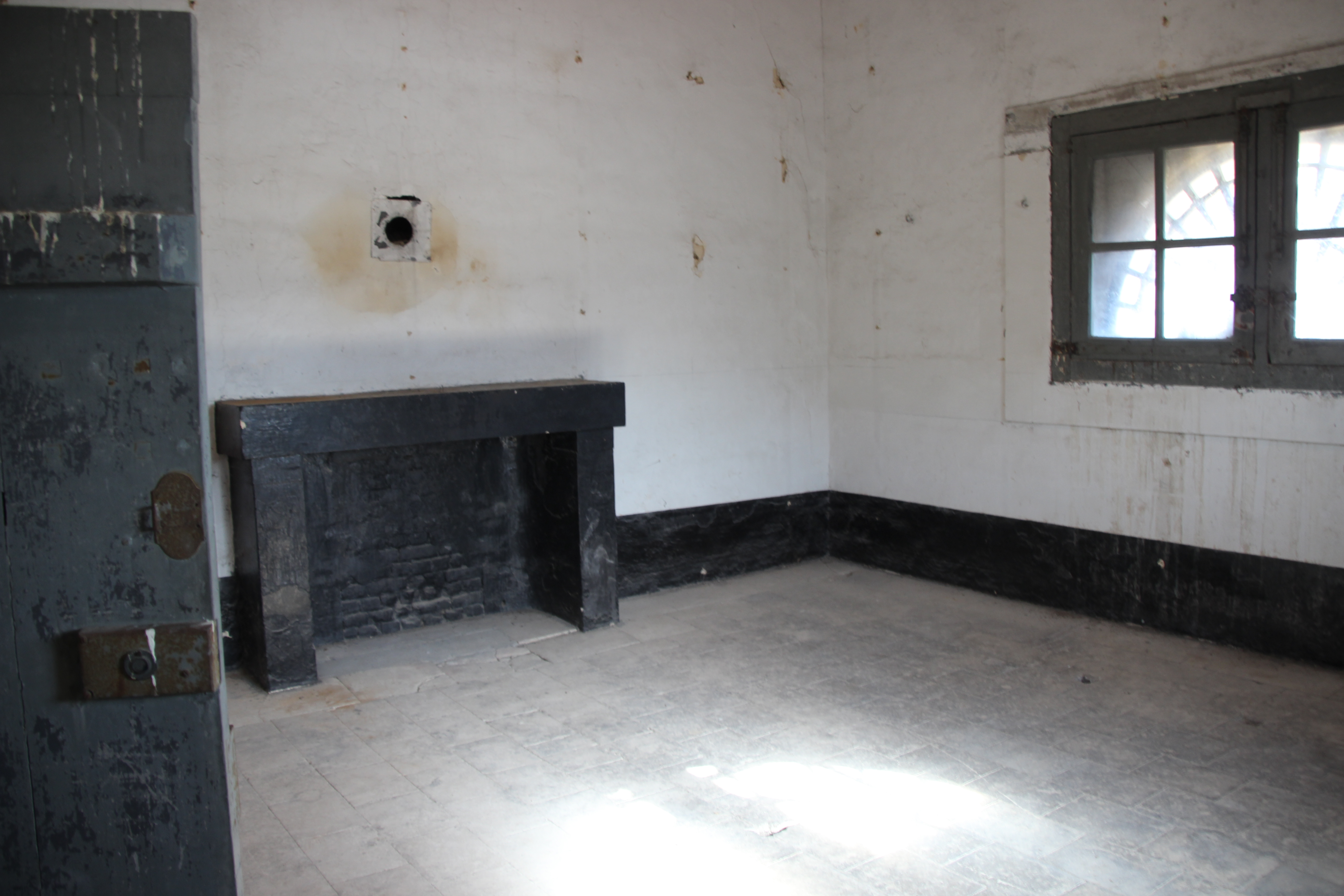 Ancienne prison (Pont-l'Évêque, Calvados)